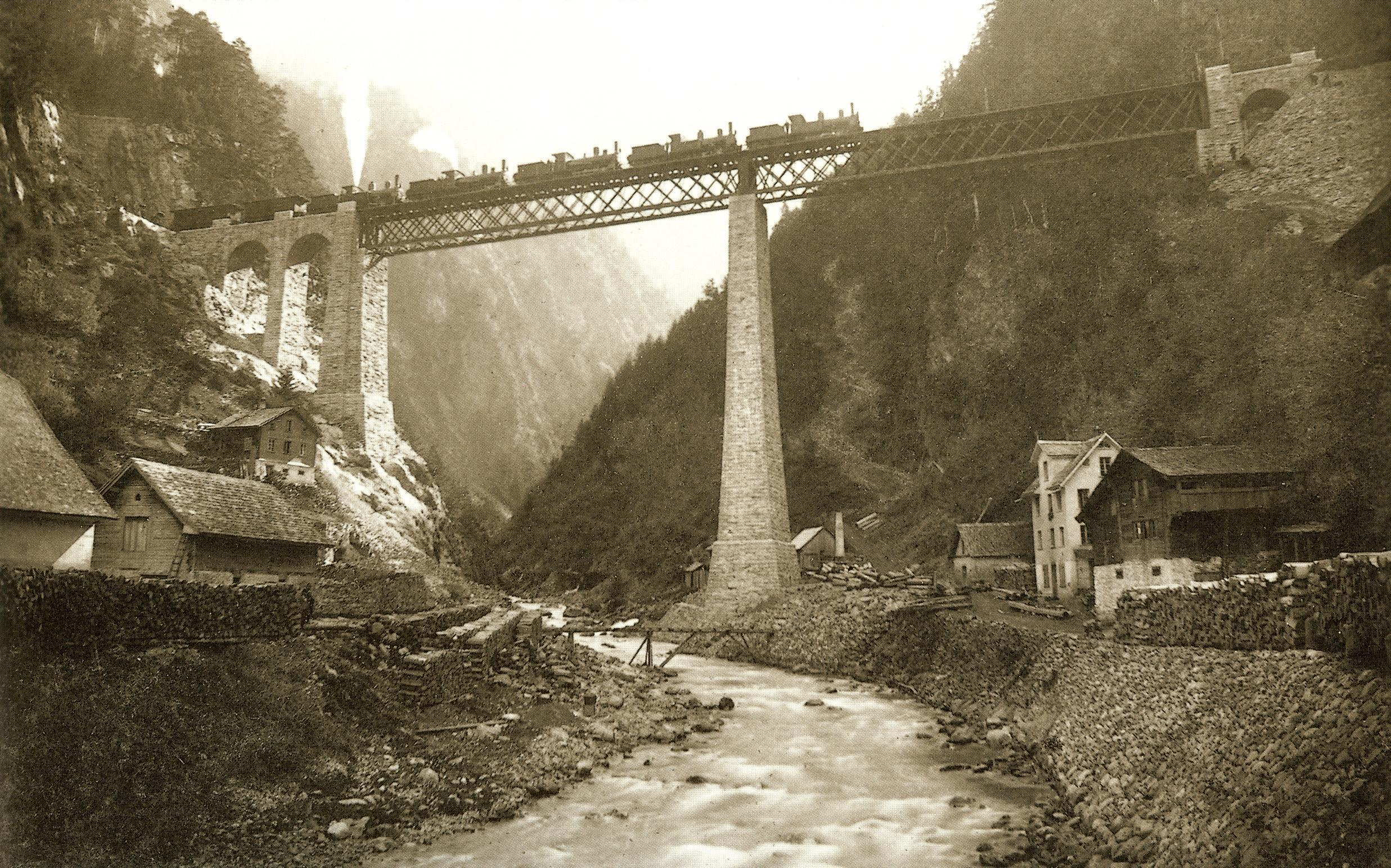 Belastungsprobe der Chärstelenbachbrücke (Gesamtlänge: 127 m, Spannweite: 50,5 m) der Gotthardbahn